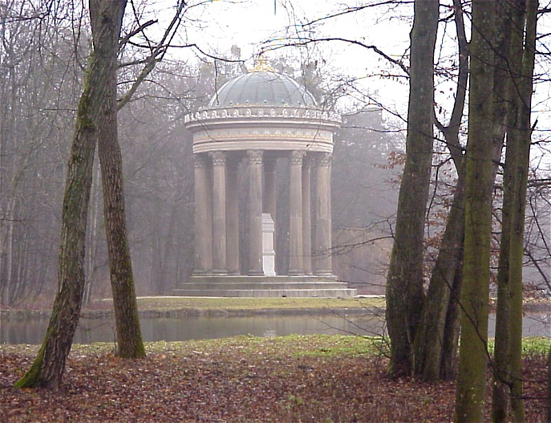 Apollotempel im Schlosspark Nymphenburg, Muenchen